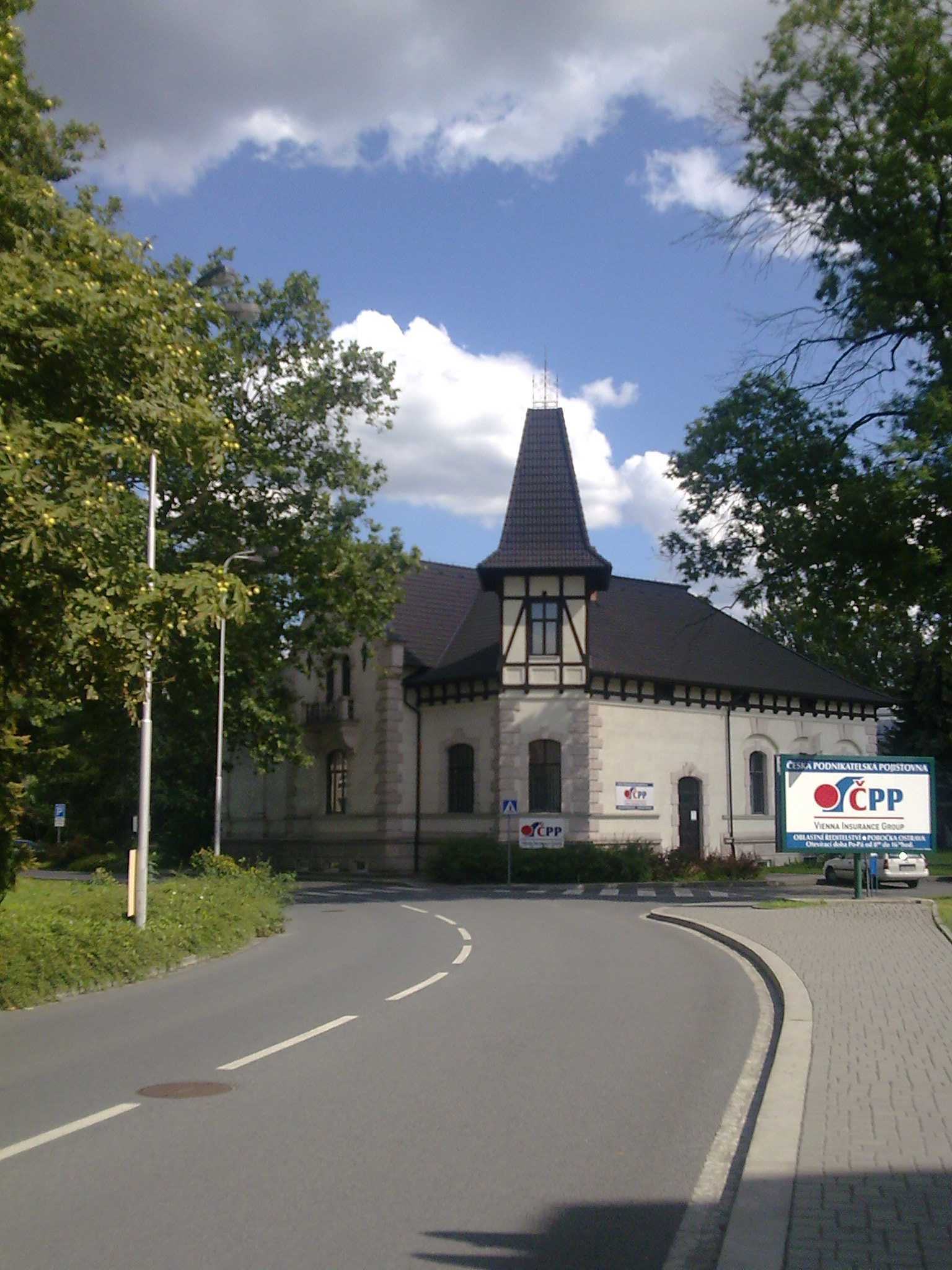 ciekawy budynek przy ul. Střelniční, Střelniční 78/16, Moravská Ostrava.